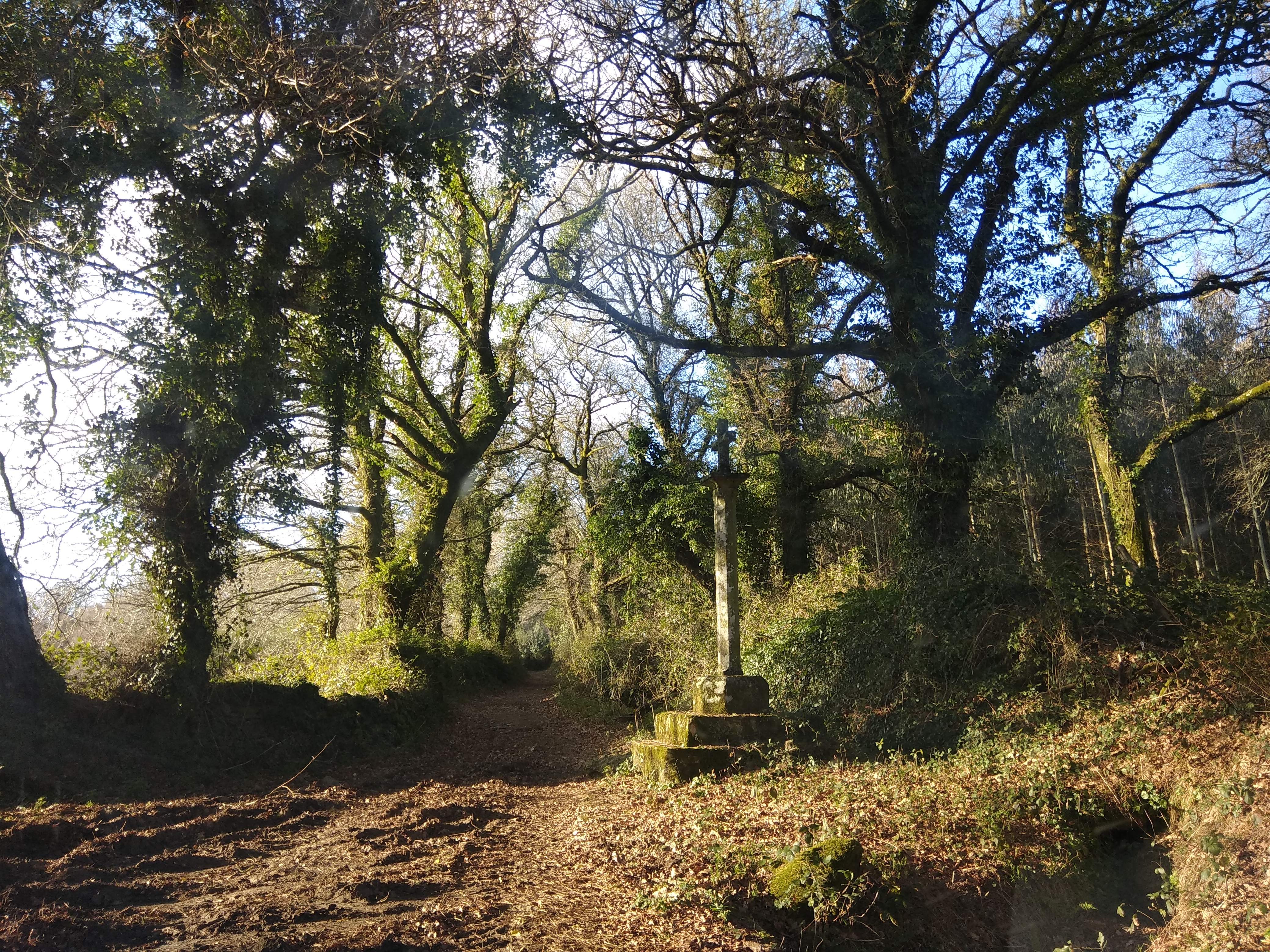 Cruceiro do Pereiro de Arriba (Cumbraos, Sobrado, Galiza).